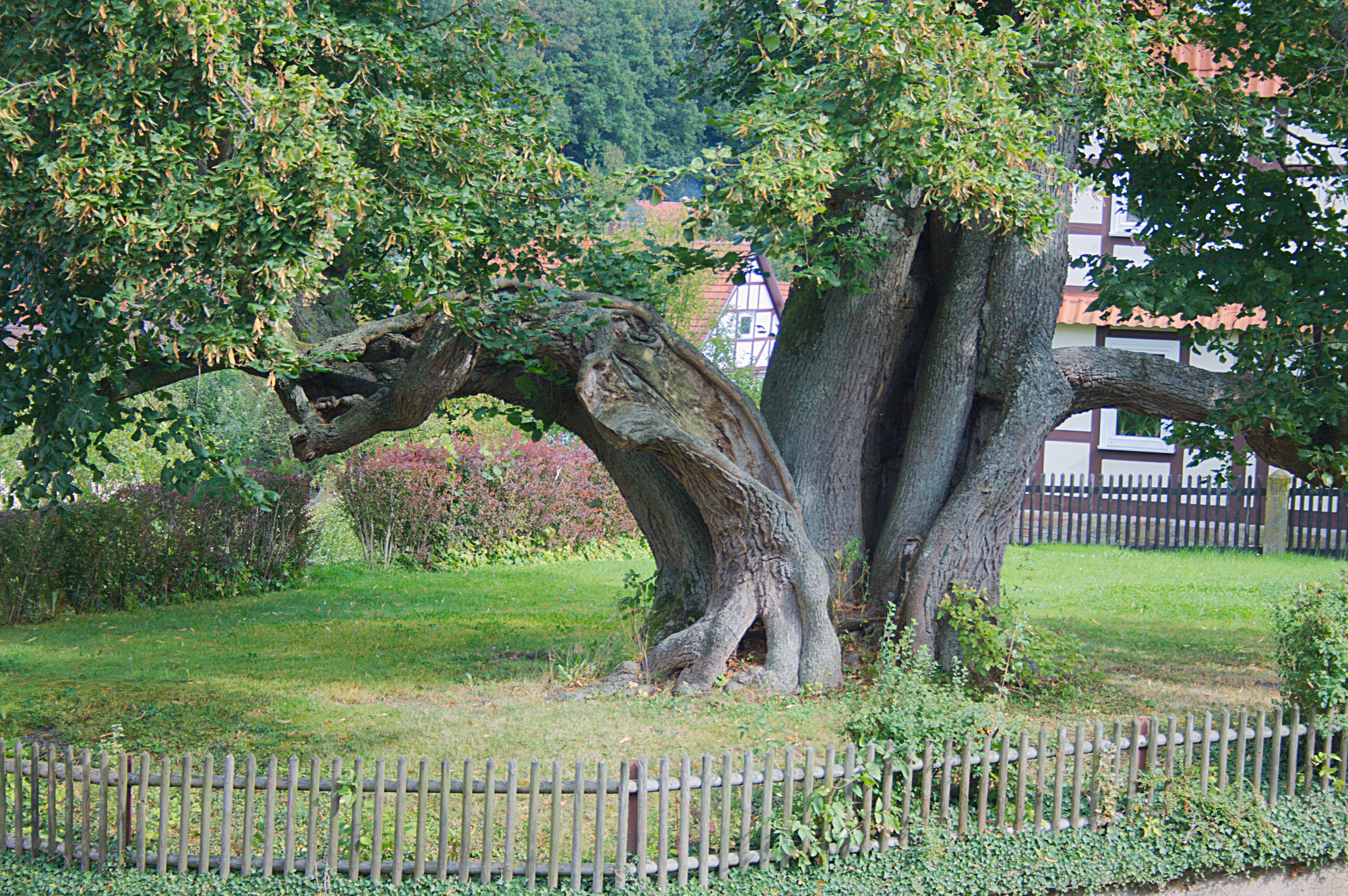 Naturdenkmal Tanzlinde in Breitzbach (Herleshausen, Hessen)